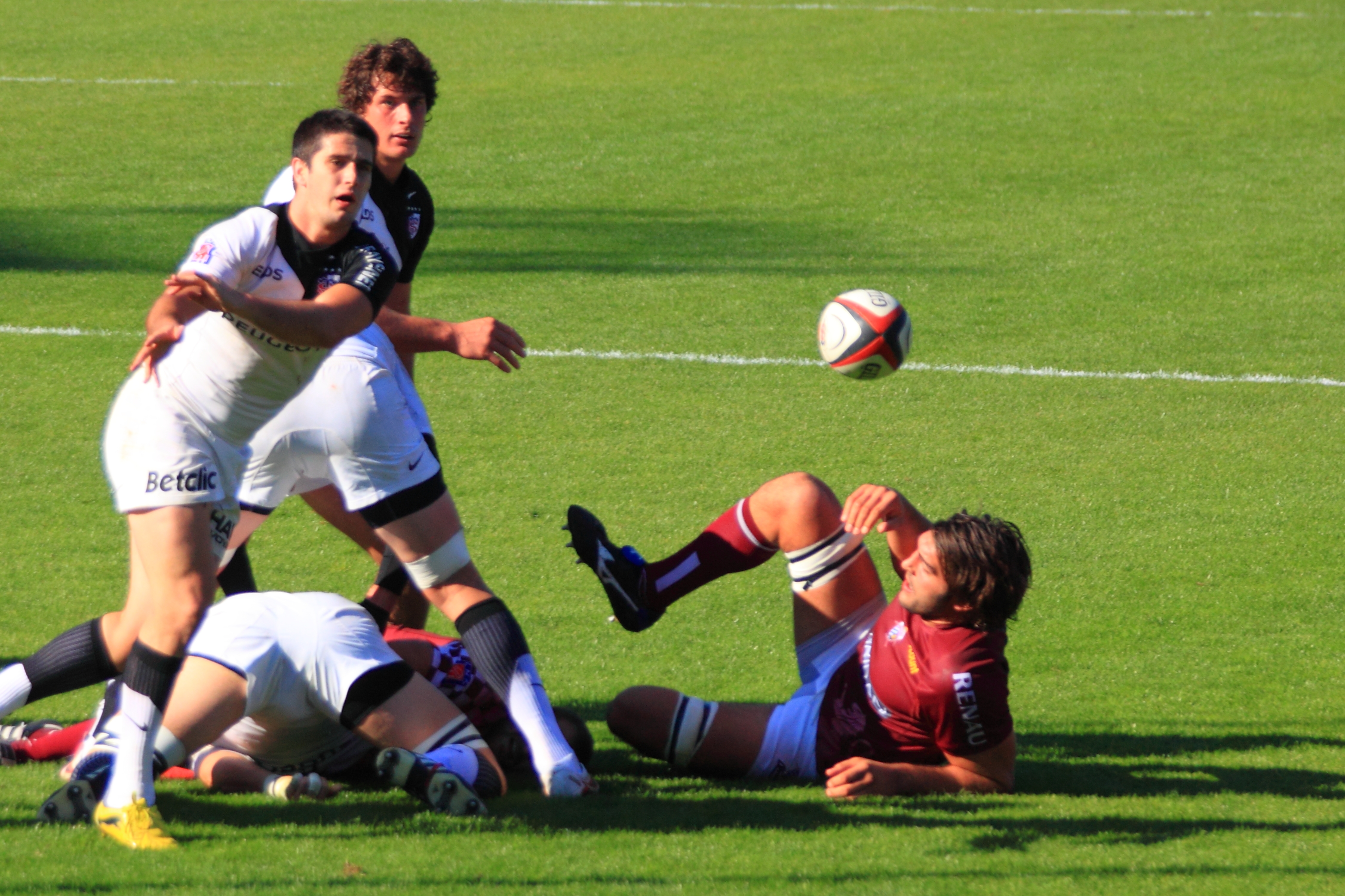 Nicolas Bézy sort la balle d'un regroupement lors de la rencontre de top 14 Stade toulousain vs Union Bordeaux Bègles